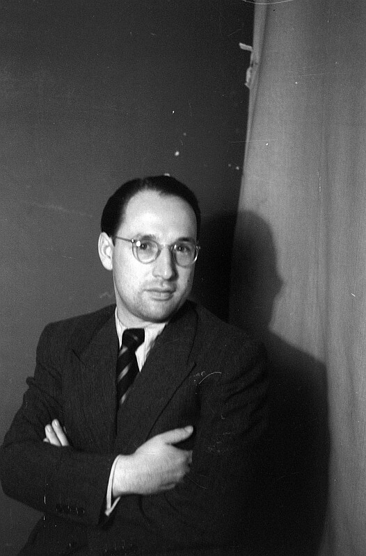 Original image description from the Deutsche Fotothek Porträts: Prof. [Max ?] Pechstein, [Johannes?] Stroux, Kraus, Benedik, Lederer, Theodor Plivier, Prof. Victor Klemperer und Klaus Gysi